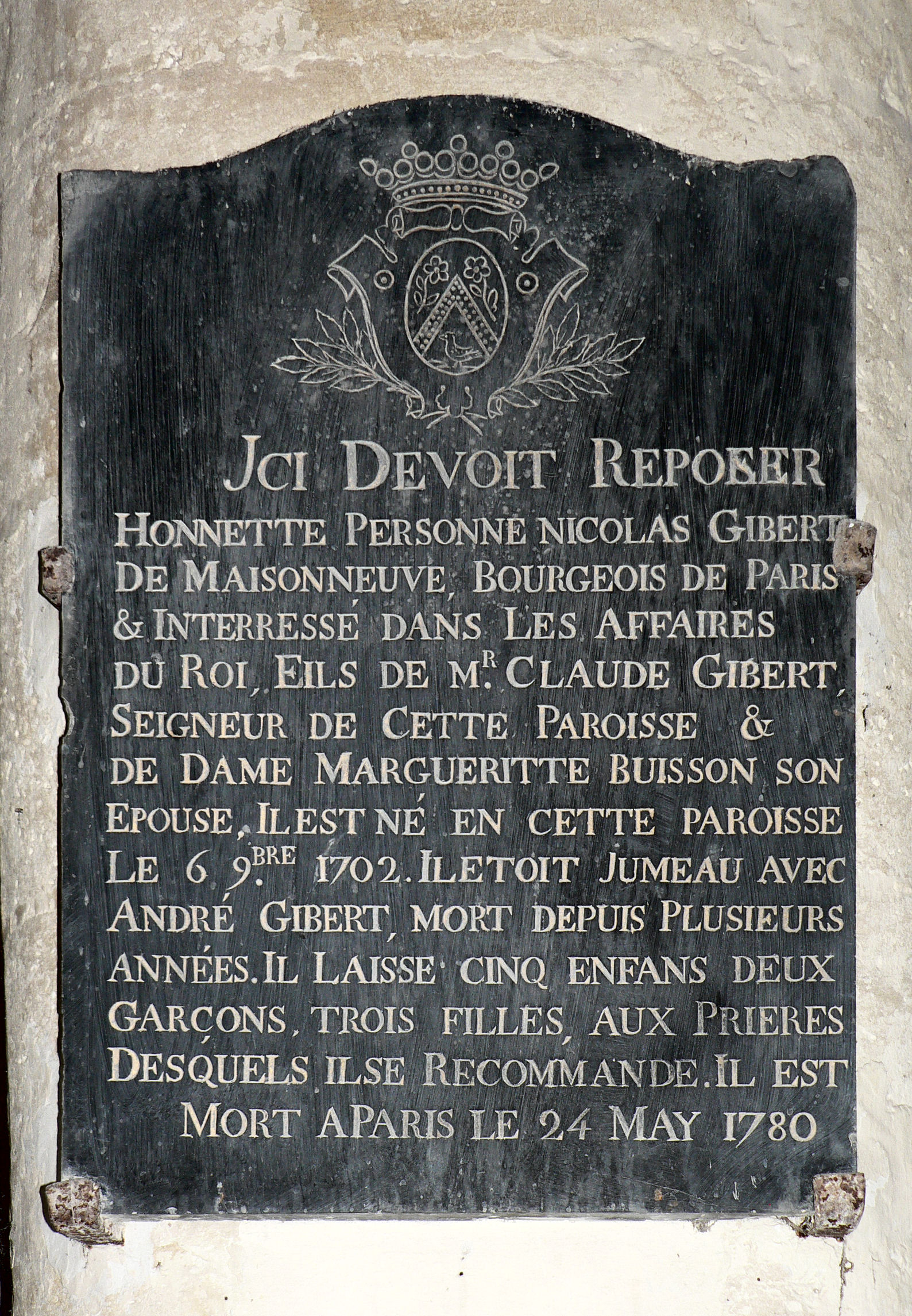 Nicolas Gibert, ° 1702, + 1780.